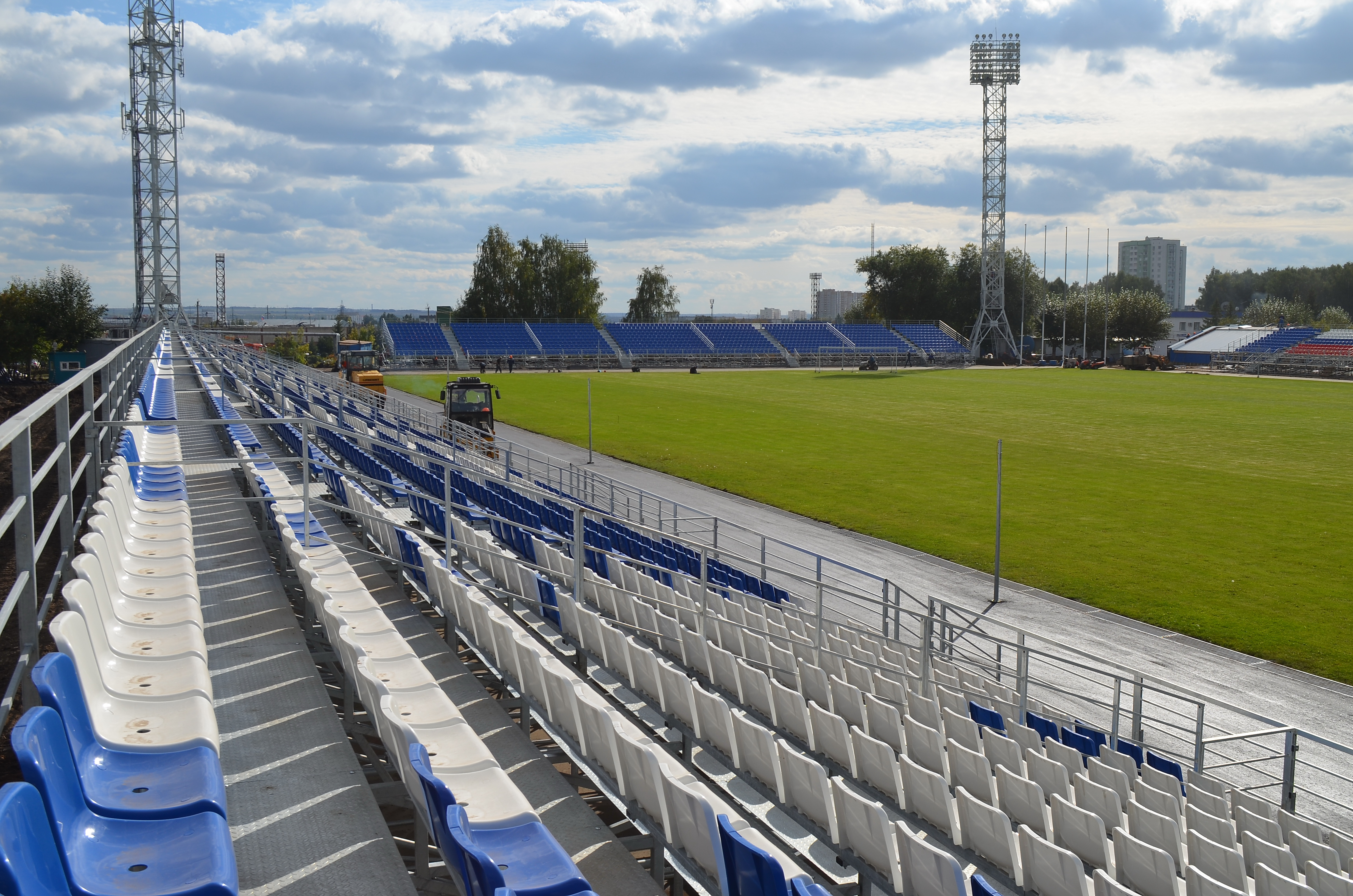 Восточная и южная трибуны стадиона "КАМАЗ" в Набережных Челнах.